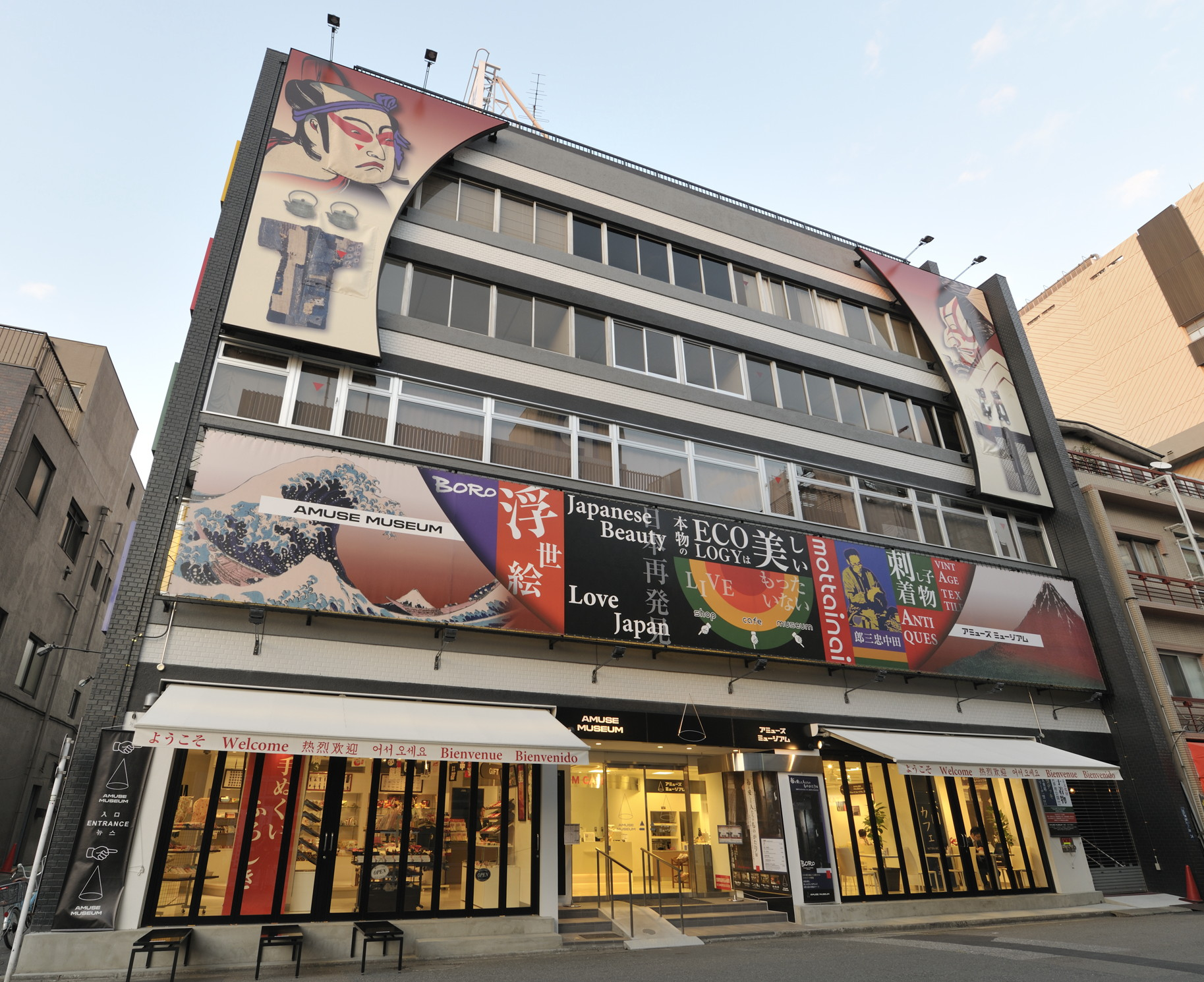 アミューズミュージアム(〒111-0032 東京都台東区浅草２丁目３４−３)